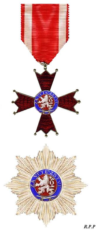 Kruis in mijn verzameling.